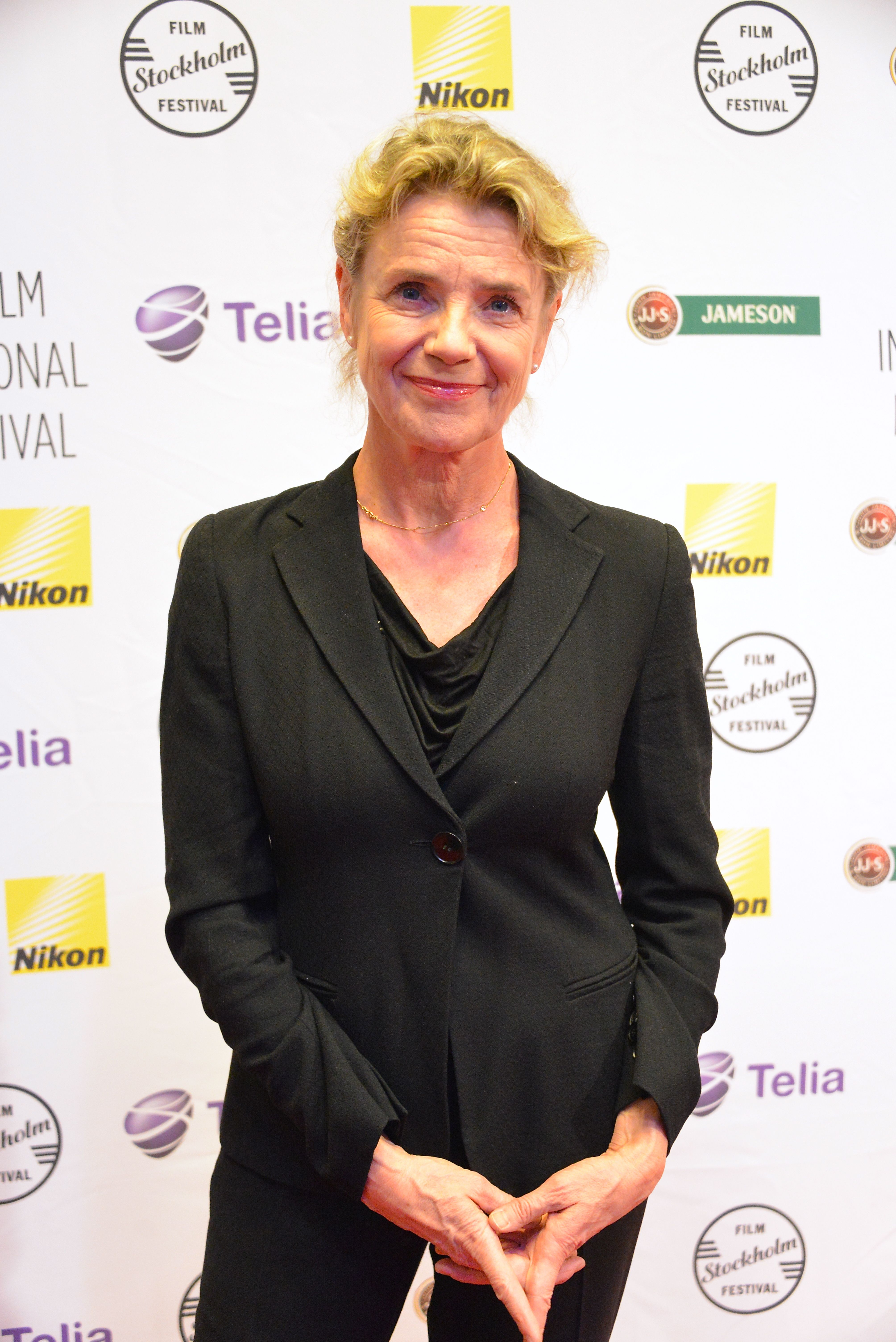 Stina Ekblad på Stockholms Filmfestival 10 november 2012.